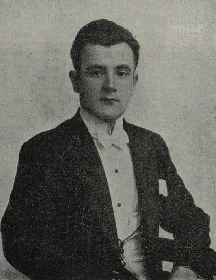 Vojta Merten, český herec-komik